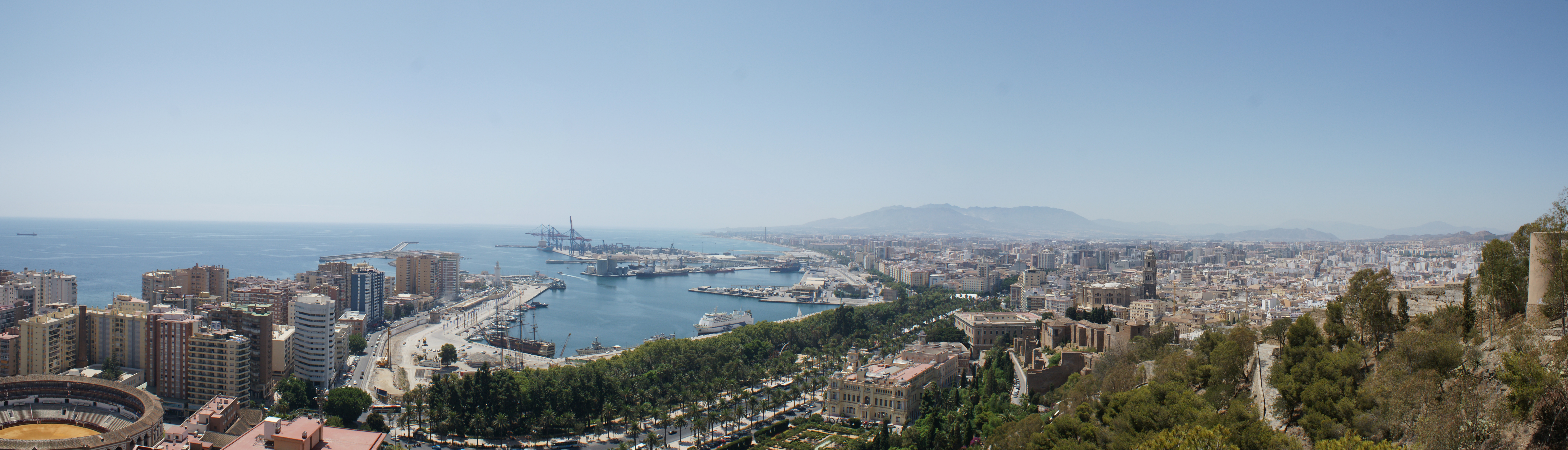 Panorámica del Puerto de Málaga